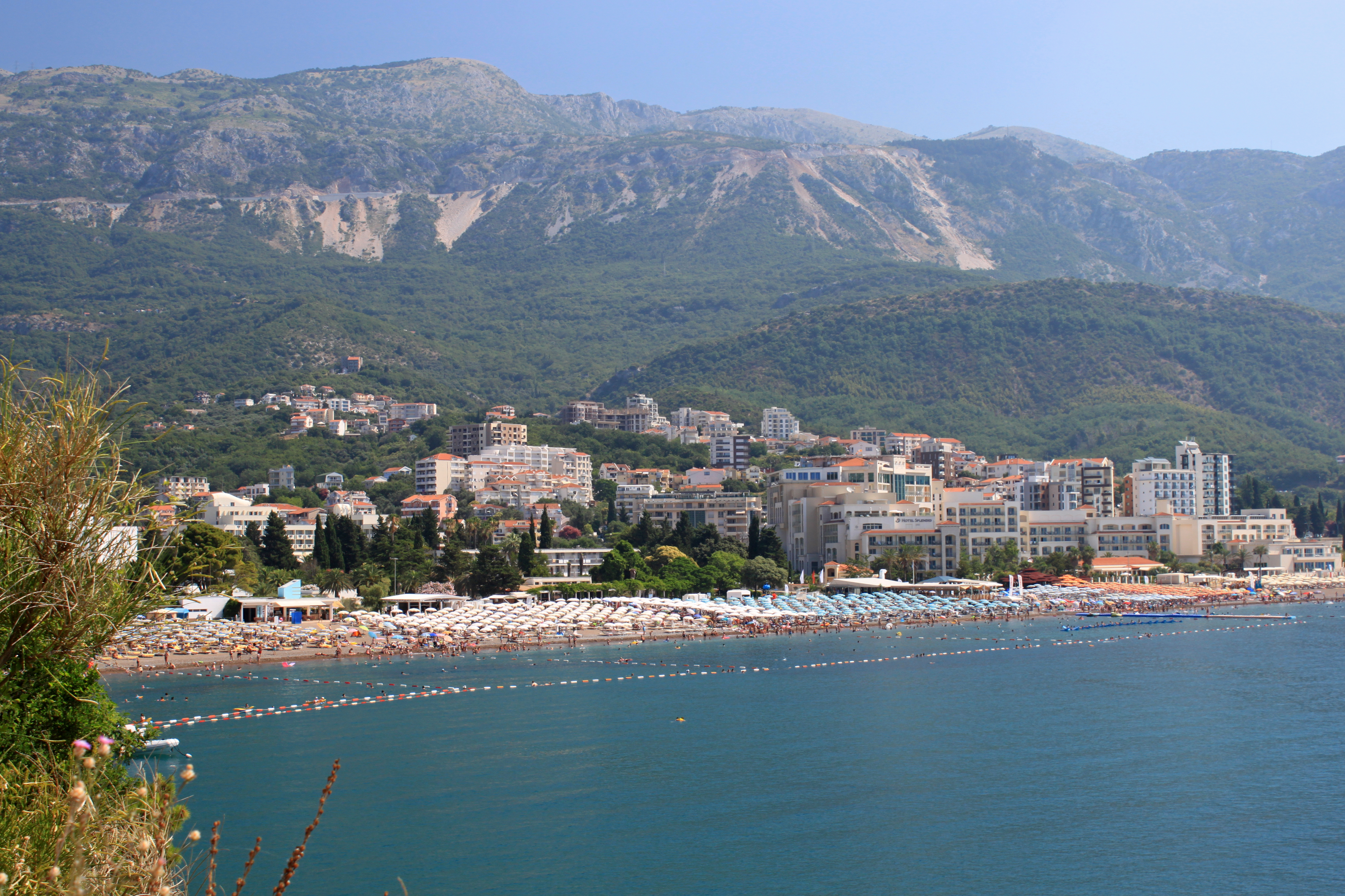 Посёлок Бечичи, Черногория. Июль 2019 года